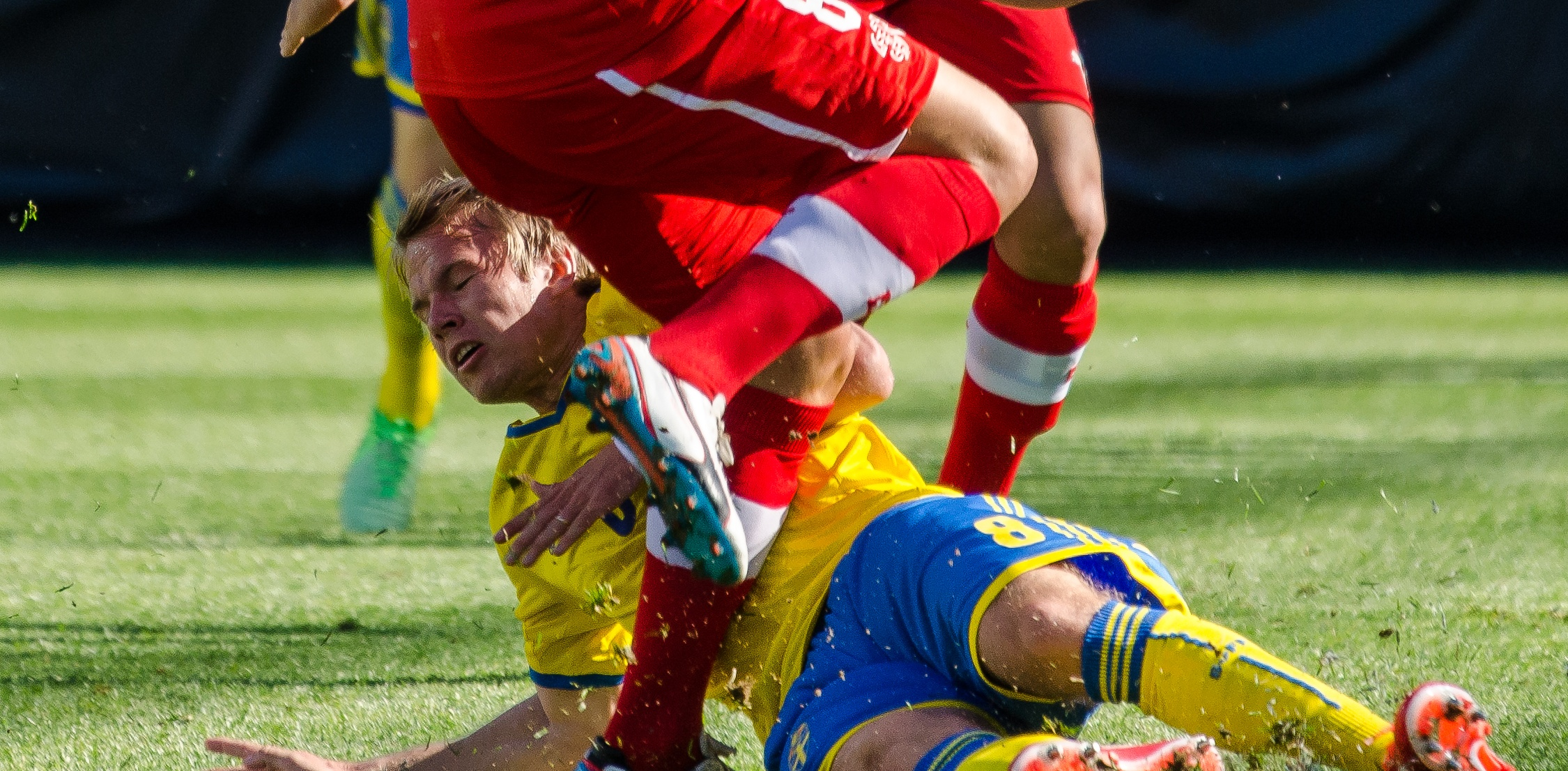 Mittfältaren Oscar Lewicki i det svenska U21-landslagets 3-2 seger mot Schweiz i en träninglandskamp på Myresjöhus Arena i Växjö, 6/6 2013.